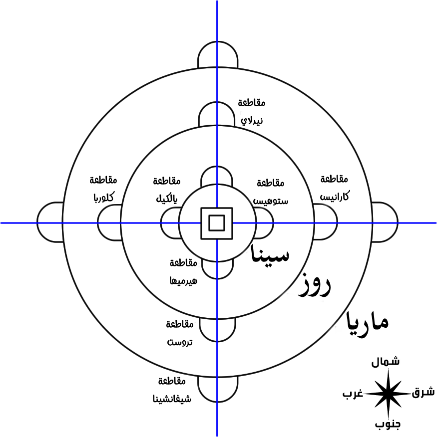 هذه هي تشكيلة الأسوار في انمي هجوم العمالقة